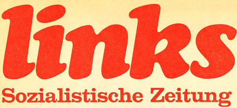 Logo von links - Sozialistische Zeitung